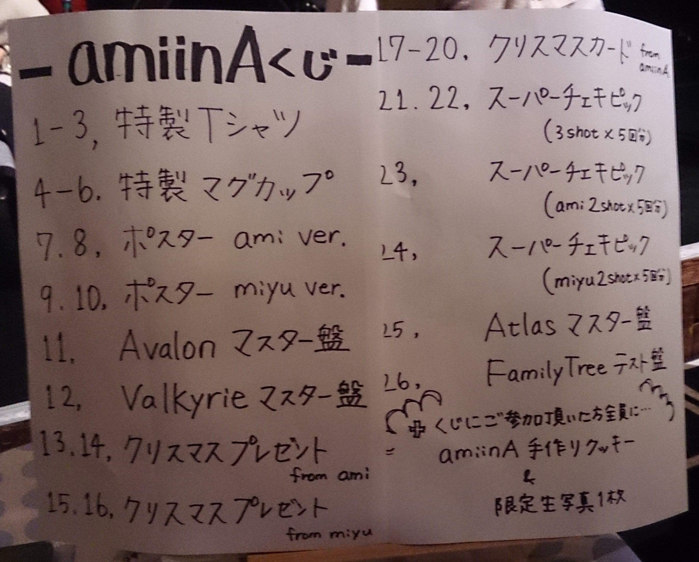 amiinAセトリボード(20171225(1-2))